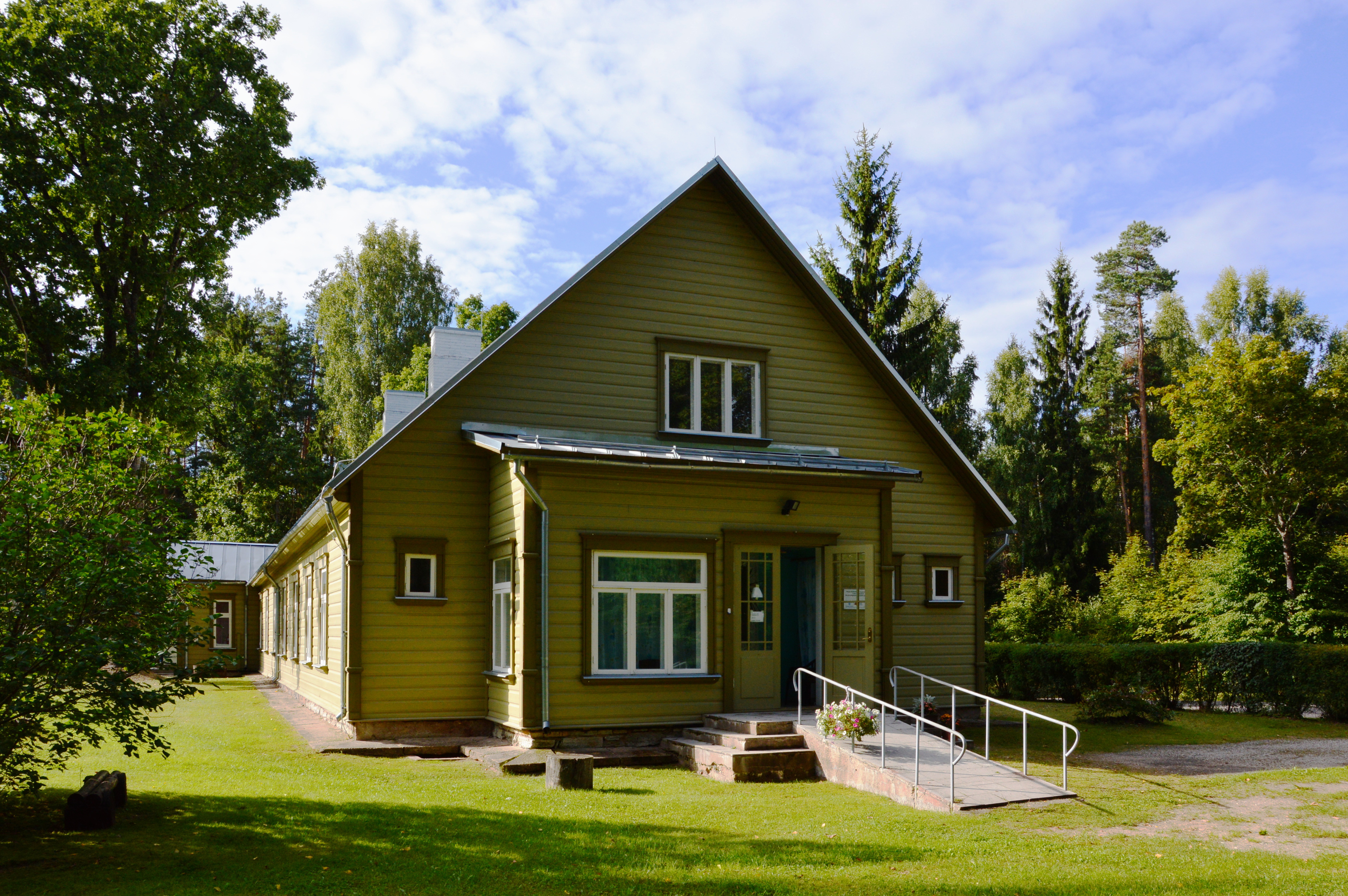 Taheva mõisa metsniku elamu